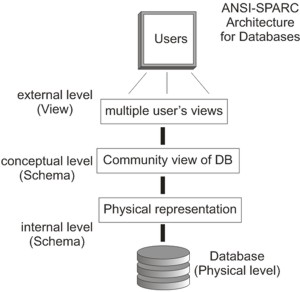 ANSI-SPARC DB model